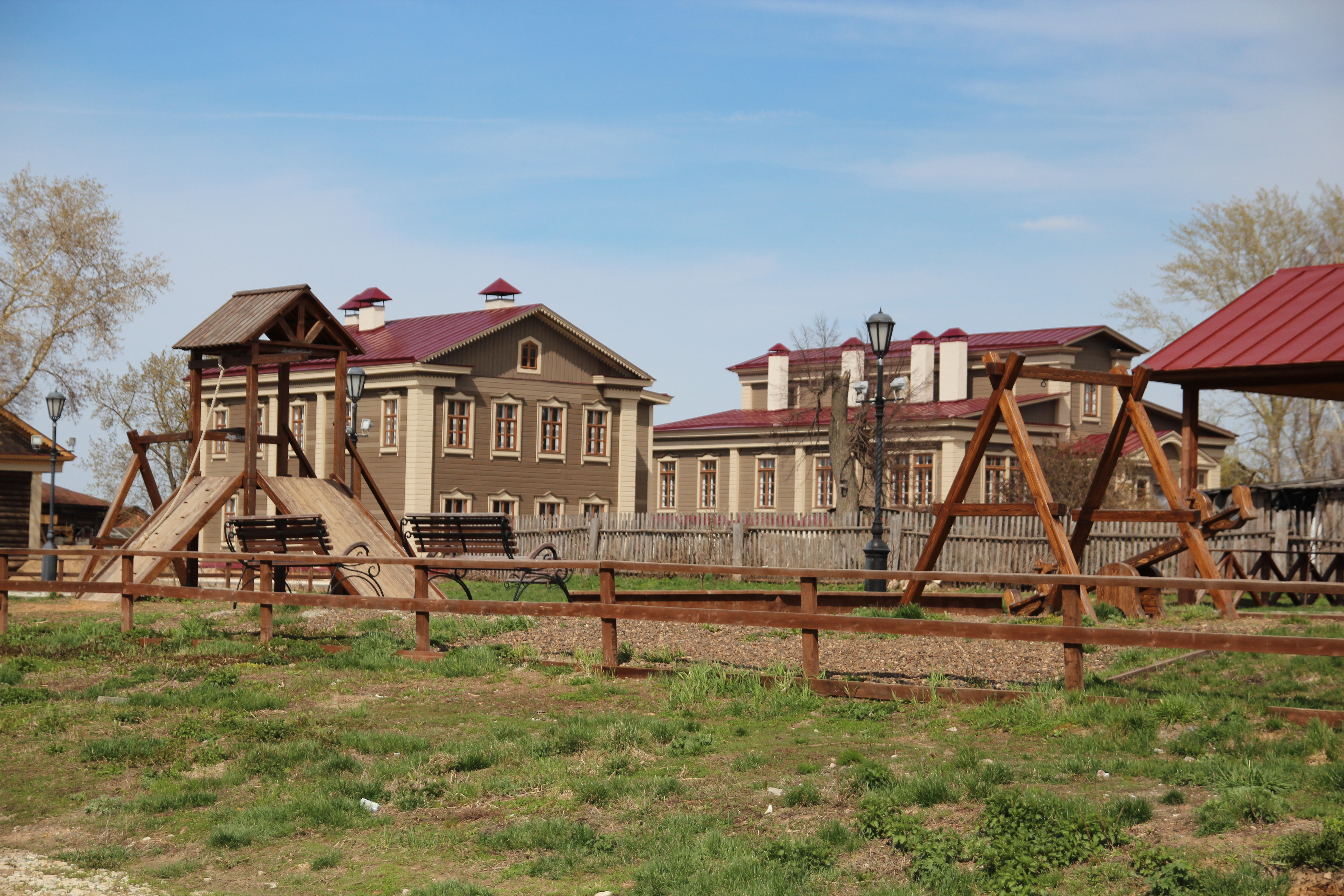 Комплекс зданий земской больницы: улица Никольская, Свияжск, Зеленодольский район, Татарстан